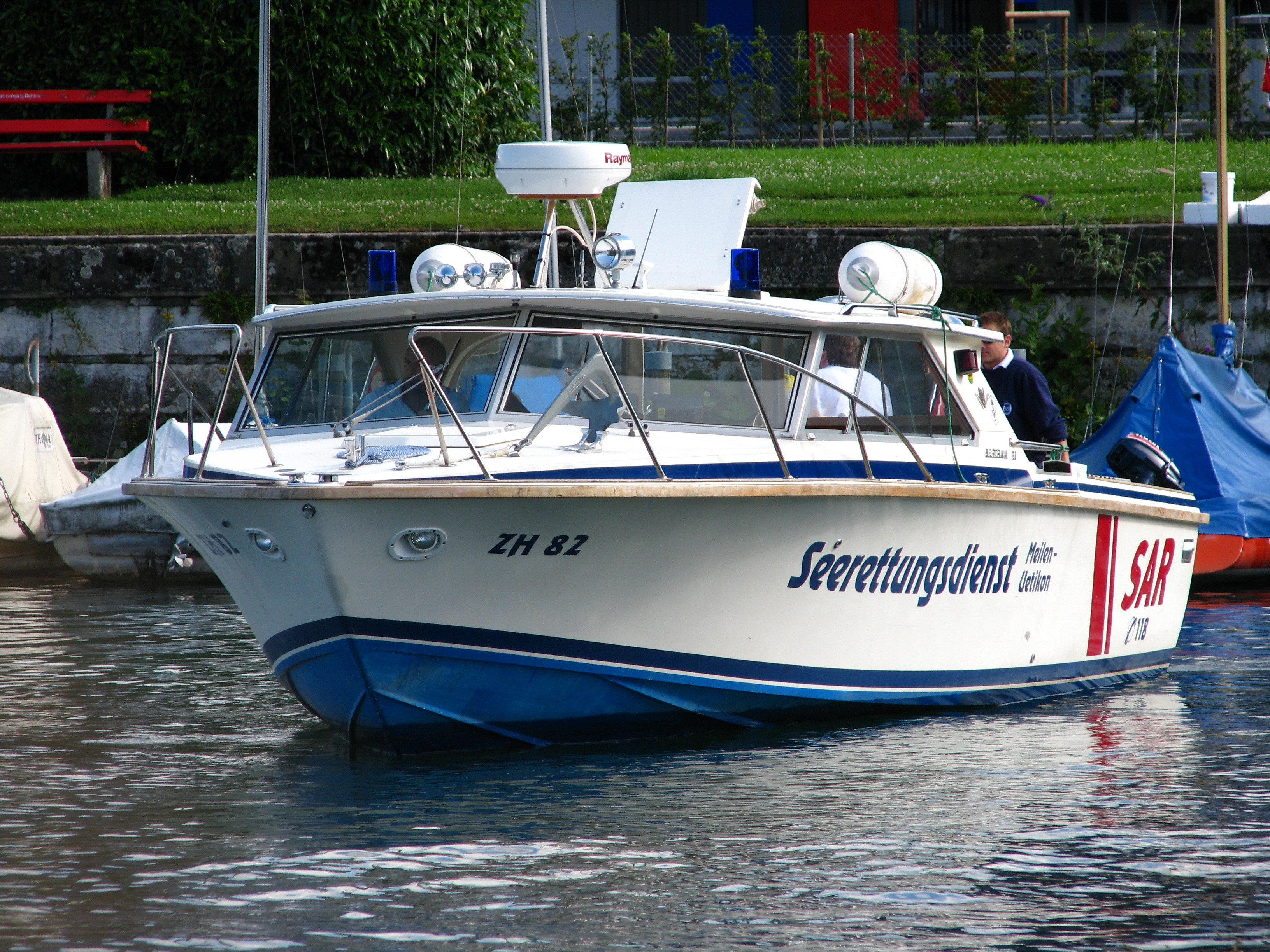 Search and Rescue boat of Seerettungsdienst Meilen-Uerikon (Switzerland), as seen in Horgen harbour on Zürichsee (Lake Zürich).